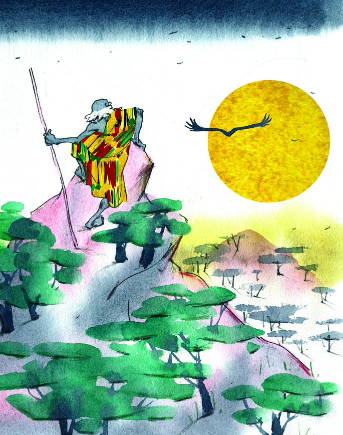 Jokin Mitxelenaren ilustrazioa.